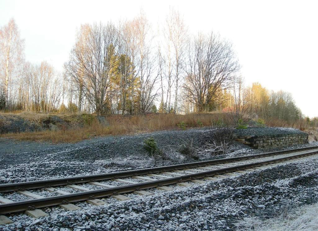 Her lå i sin tid Midtskog stoppested på Rørosbanen.